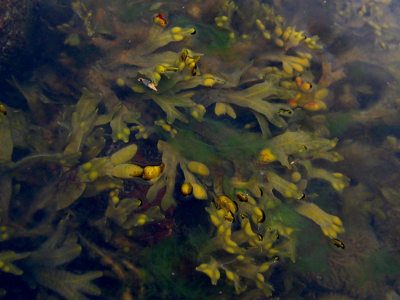 Blasentang (Fucus vesiculosus), Binz